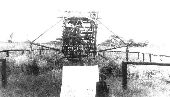 Resti dell'apparecchio di Antonio Locatelli a Lekemti.